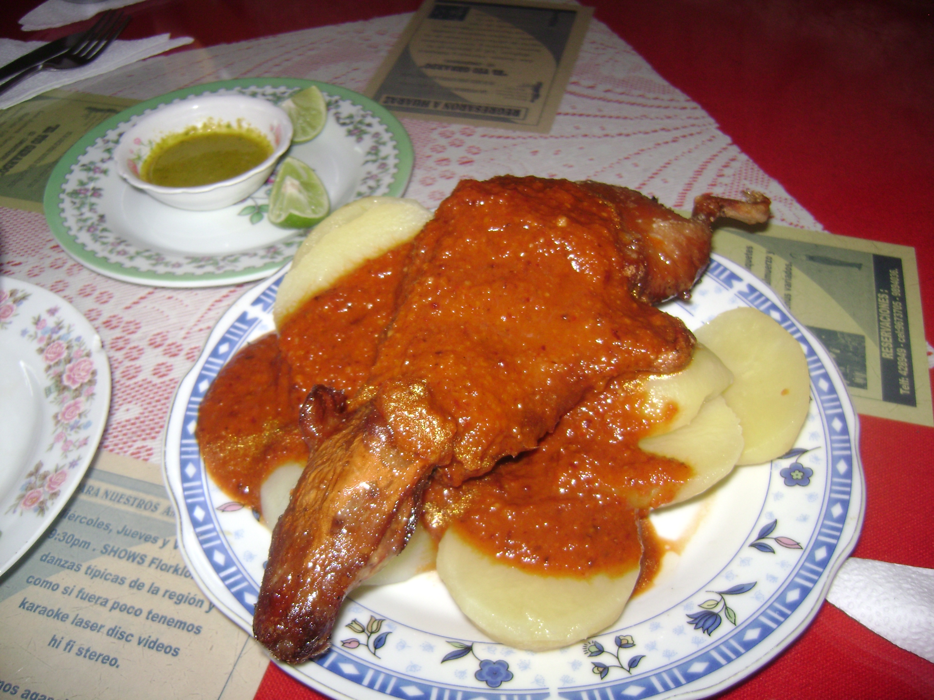 Un plato de 'Picante de Cuy' servido en un resturant de la carretera que une la ciudad de Huaraz con la zona del nevado Pastoruri. En la parte superior izquierda puede apreciarse un envase con salsa de ají, uno de los usuales acompañamientos de este plato.